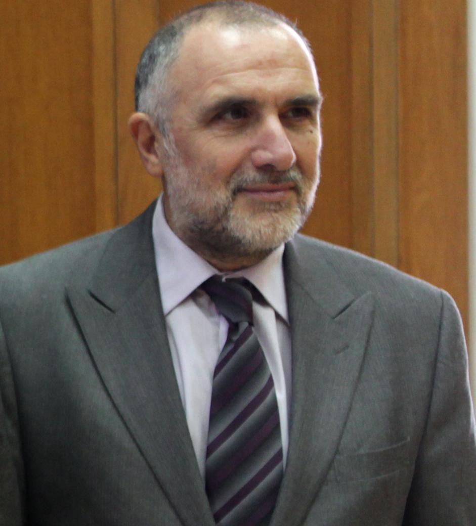 Γιάννης Πανάρετος